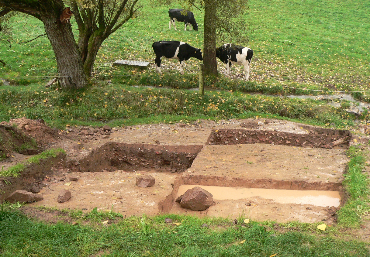 Ausgrabung der Waldglashütte im Reiherbachtal nach Grabungsende, Bereich der Halden mit Produktionsabfällen